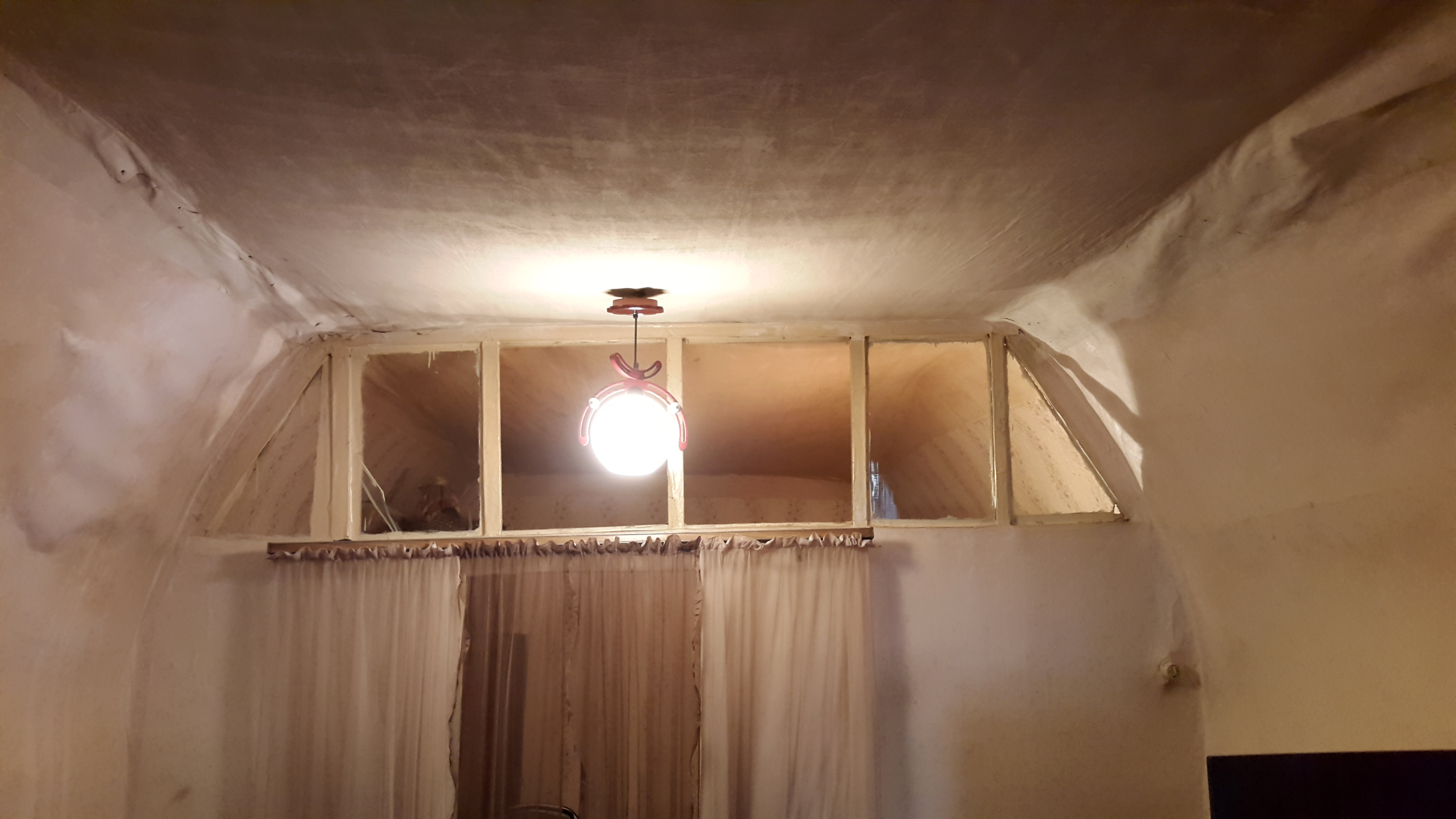 Կոզեռնի մատուռը